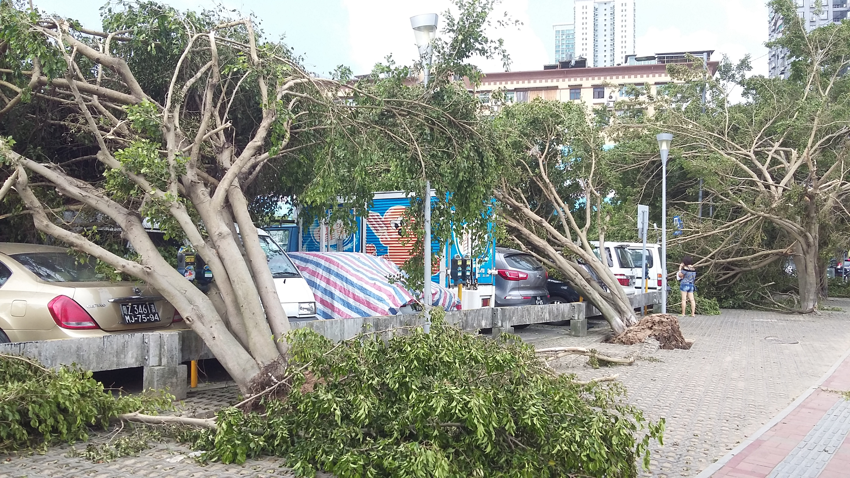 風暴過後第二日，風順堂區情況。